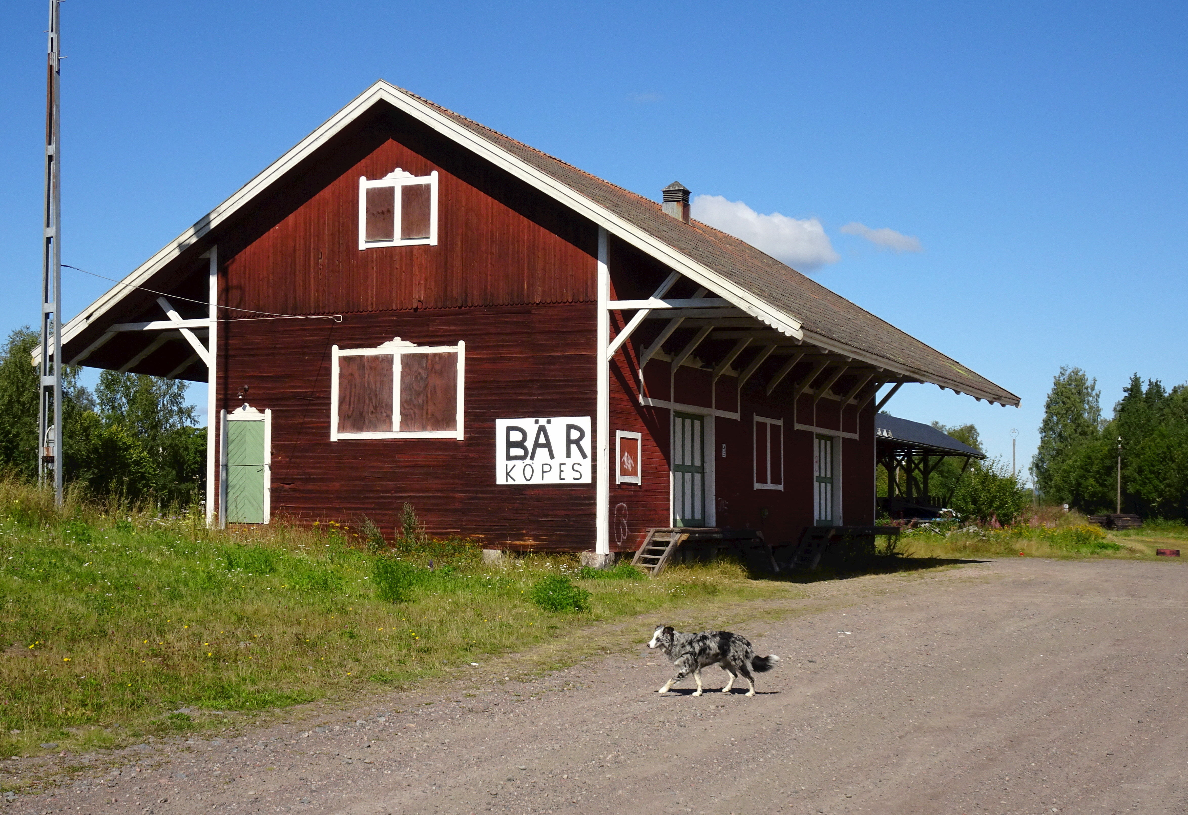 Vansbro station, godsmottagning. Vansbro järnvägsstation på Inlandsbanan byggdes 1899 och arkitekt var Erik Lallerstedt.